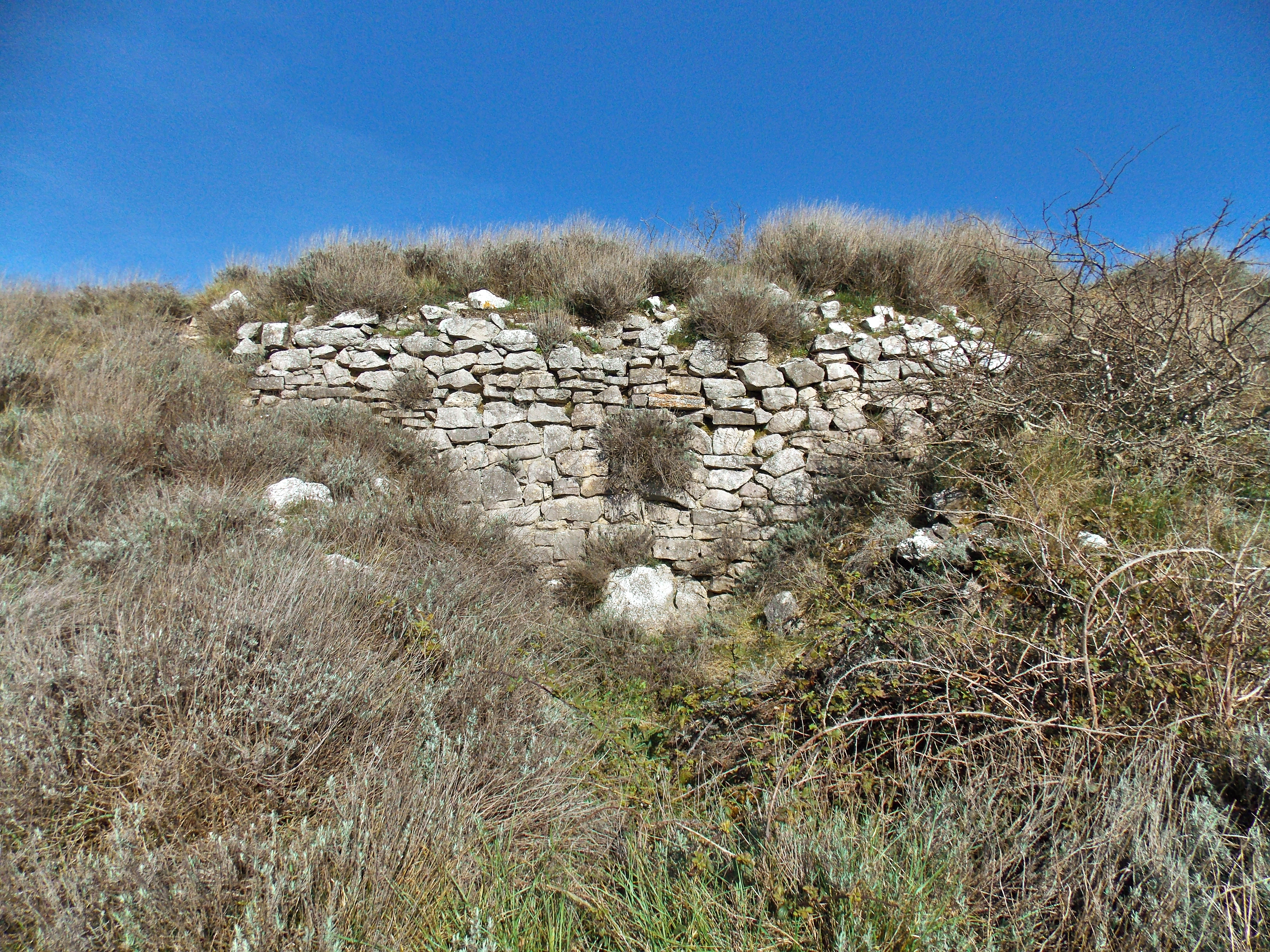 L'area archeologica di Monte Chiodo a Buonalbergo, in provincia di Benevento: muro della rocca